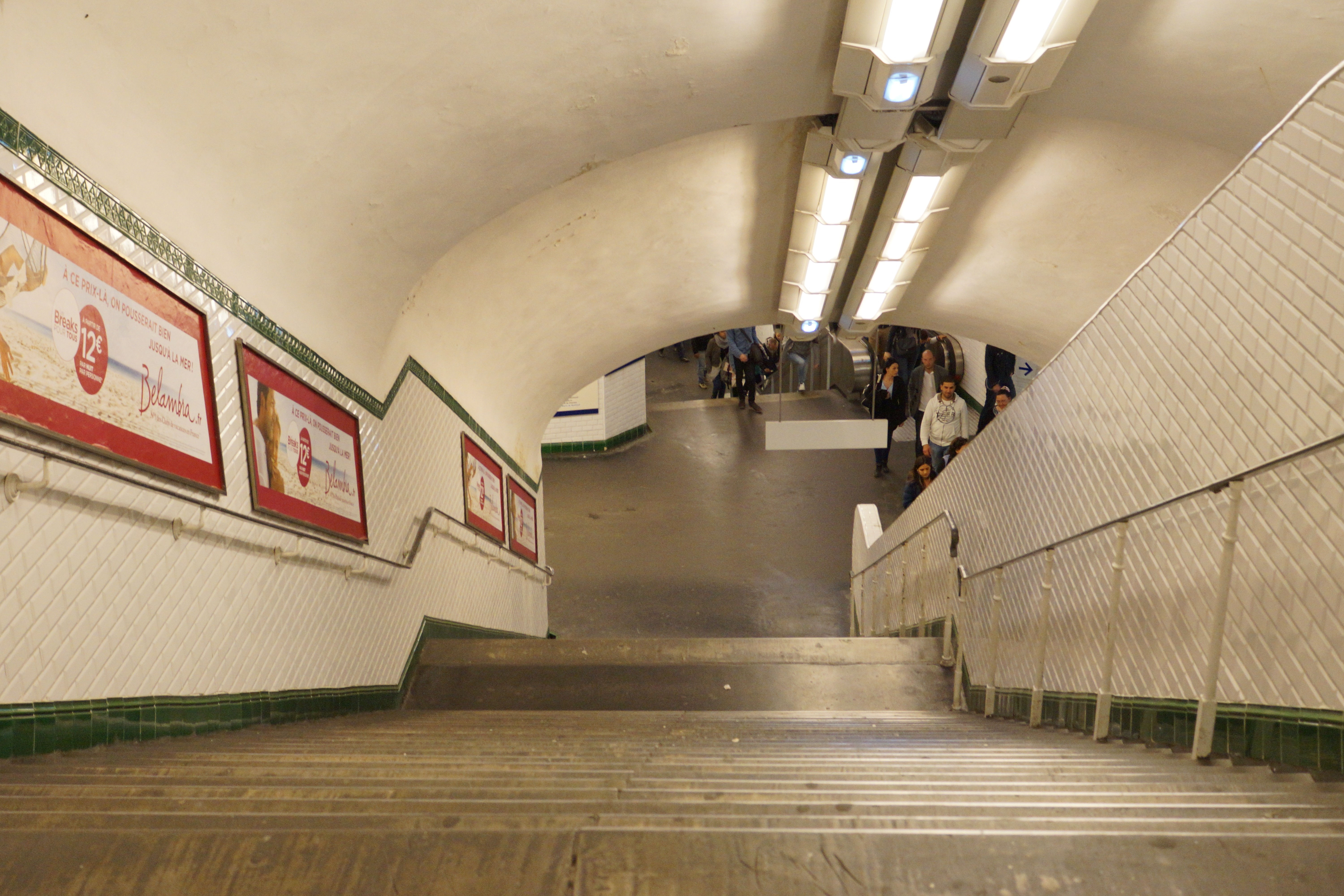 Trocadéro metro station, Paris.